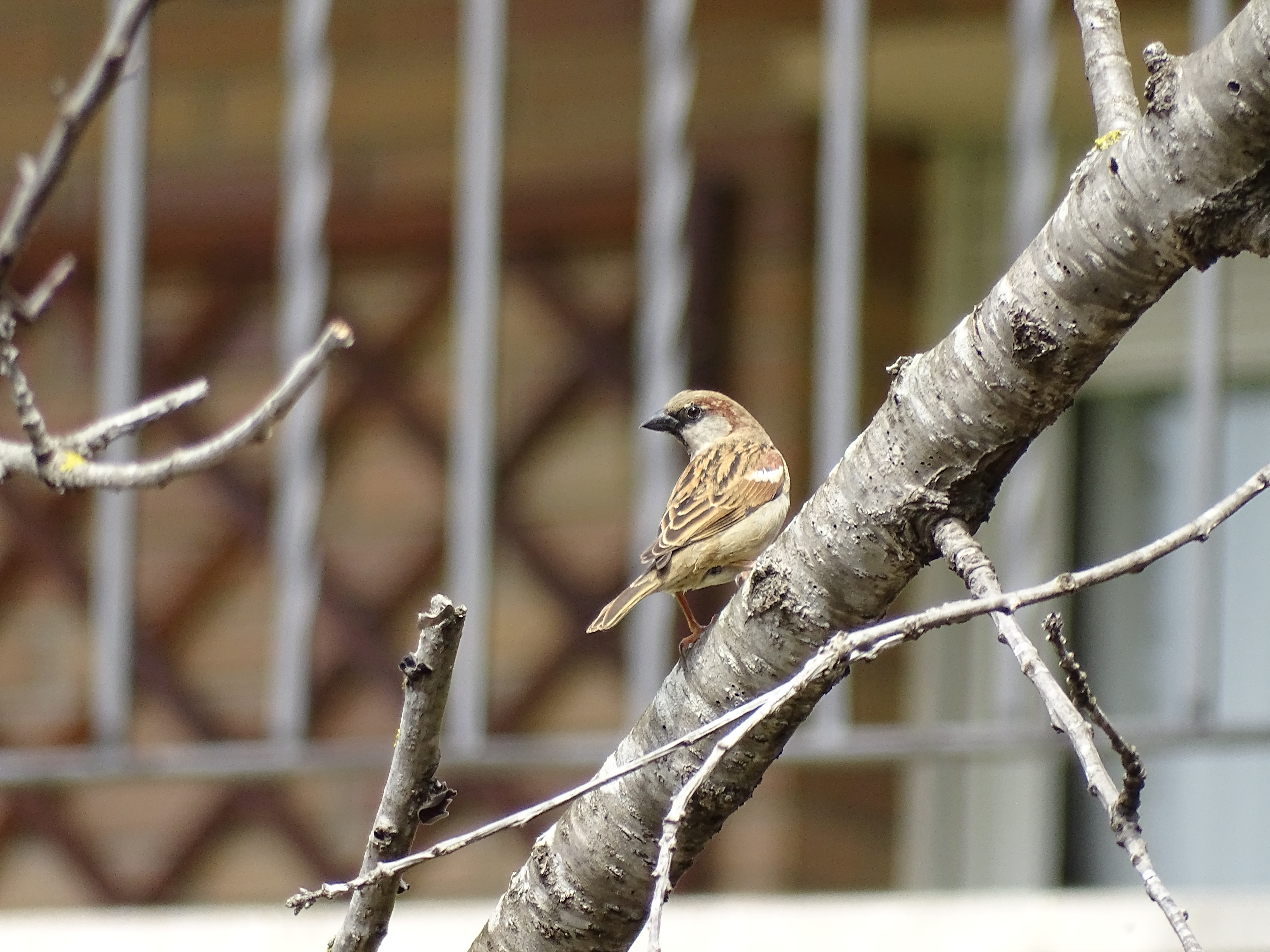 Pardal comú al Garraf.